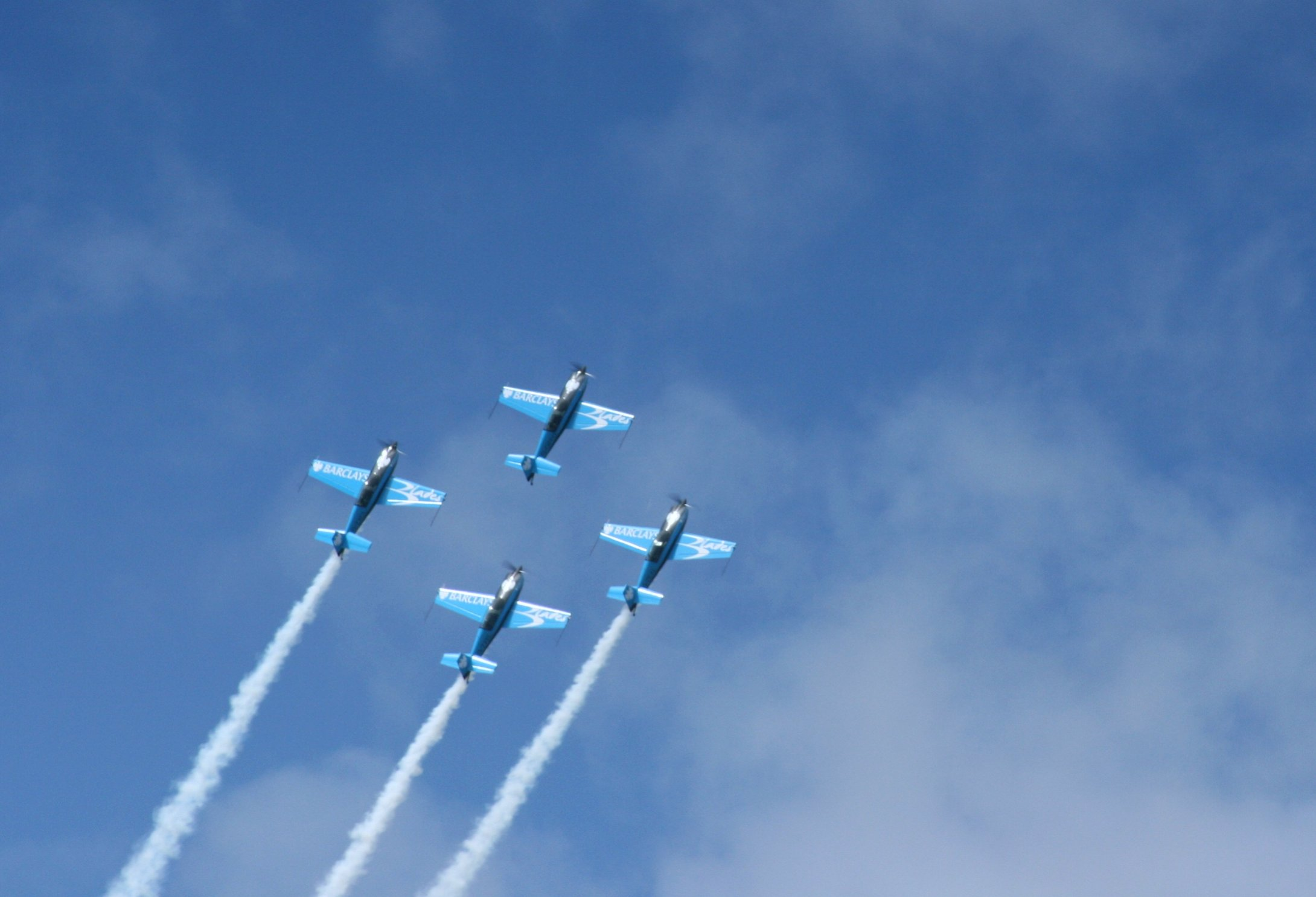 Blades Extra 300 LPS